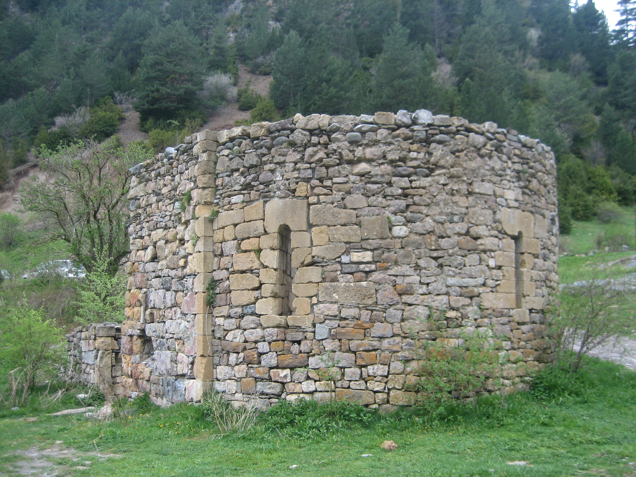 Ermita de San Nicolás de Bujaruelo (provincia de Huesca, España) This is a photography of a Site of Community Importance in Spain with the ID: ES2410006. Natura2000 entry, EEA entry